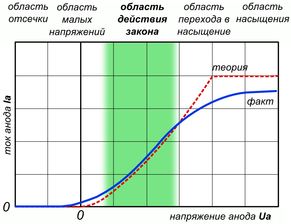 Область применимости закона трёх вторых